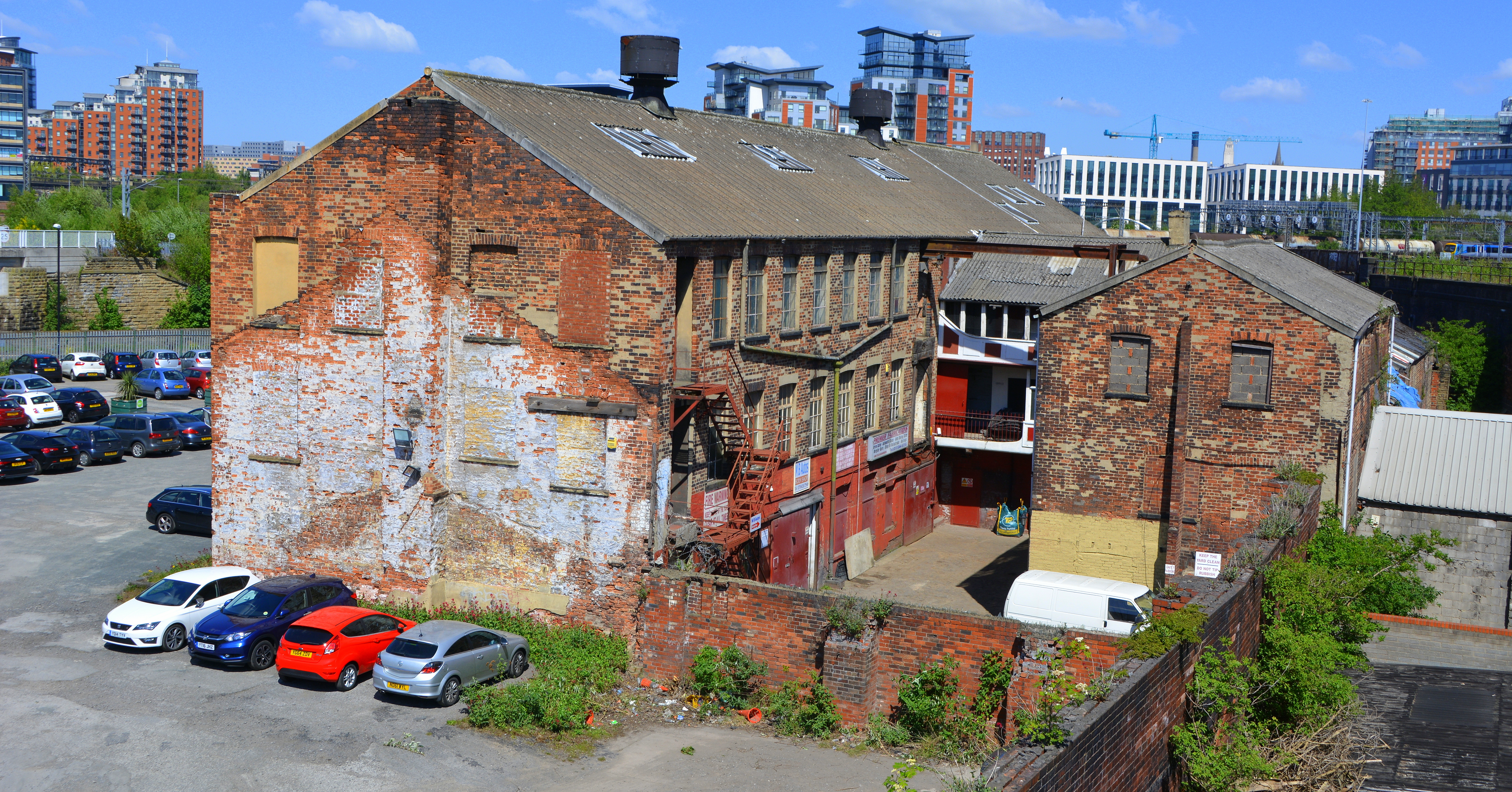 Midland Mills, Silver Street, Holbeck, Leeds